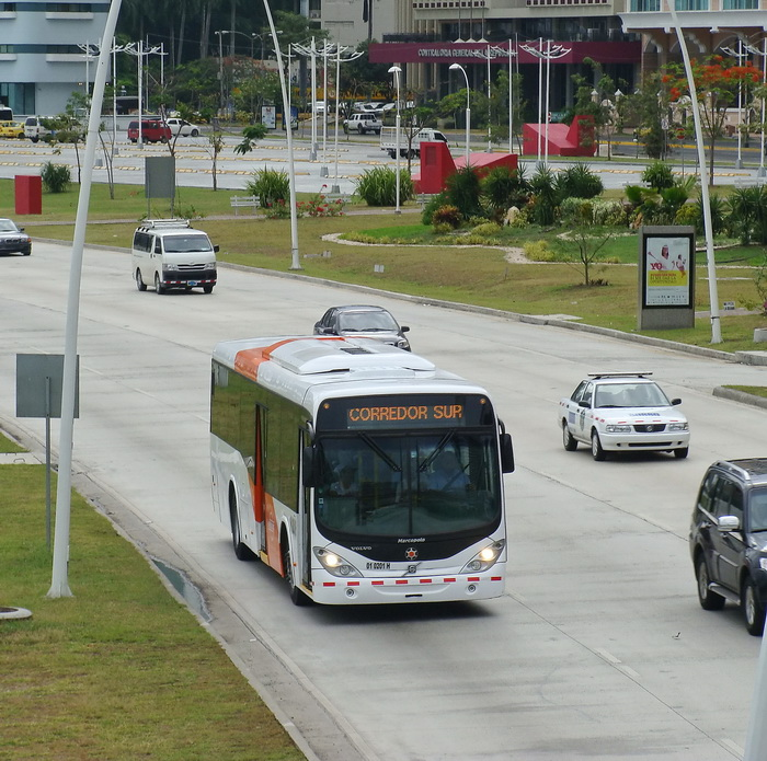 Unidad de Metrobús (Panamá) recorriendo la Cinta Costera, Ciudad de Panamá.